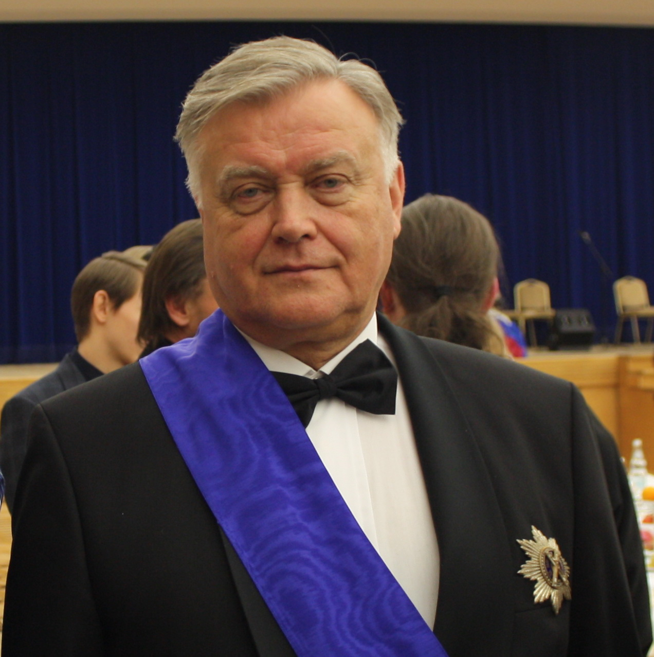 Владимир Якунин на церемонии награждения премии "Вера и Верность". Кремлевский дворец, 13 декабря 2013 года